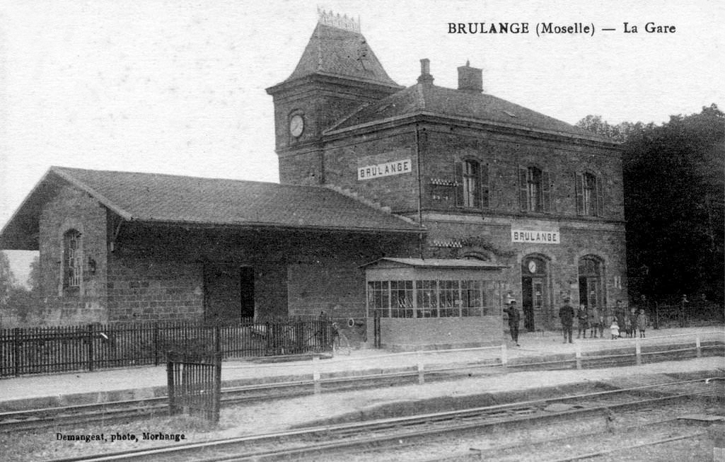 L'ancien bâtiment voyageurs allemand après la guerre 1914-1918 et le retour à la France de la gare.